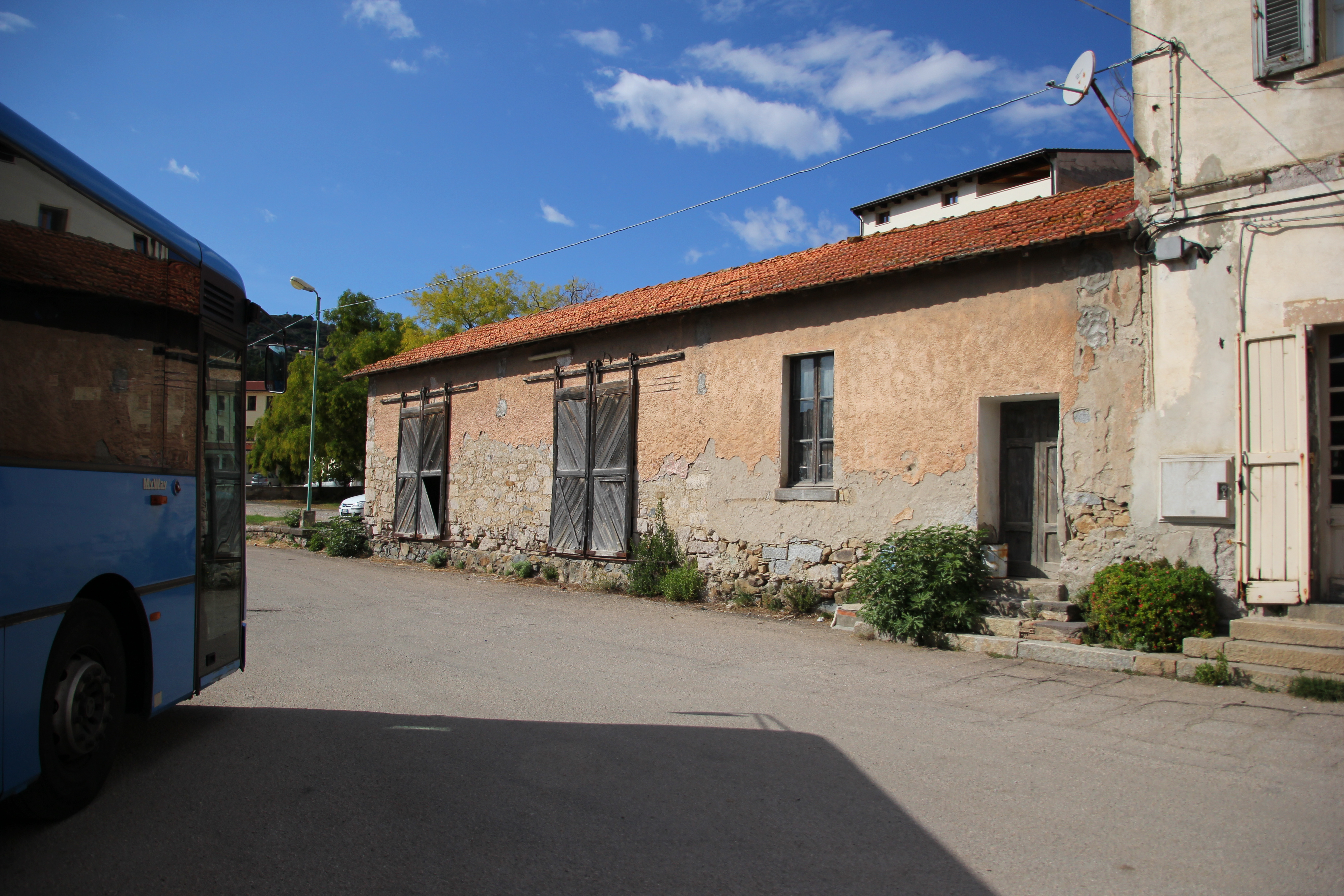 Ozieri - La vecchia stazione ferroviaria